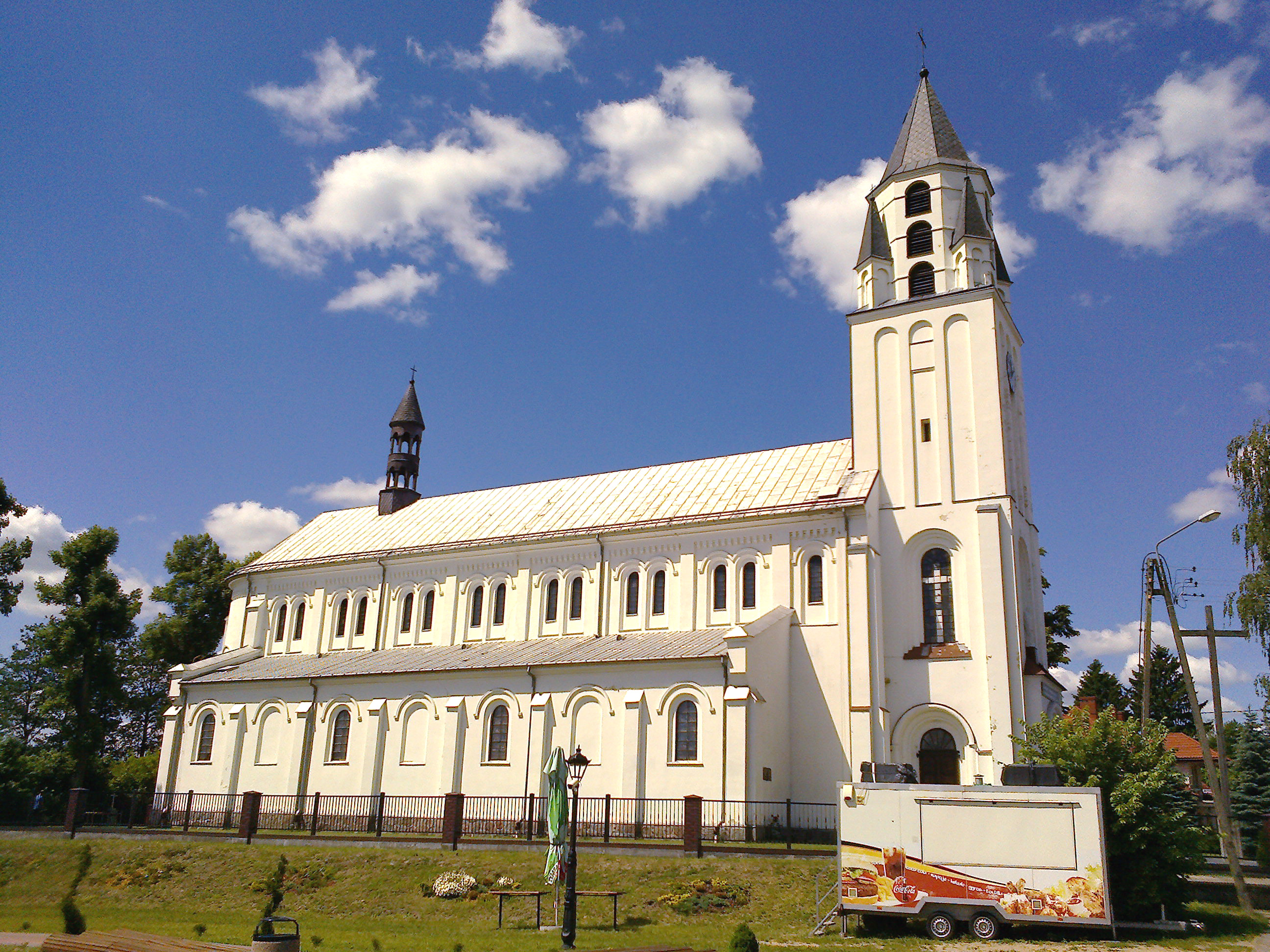 Chorzele, ul. Kościelna - rzymskokatolicki kościół parafialny pw. Trójcy Przenajświętszej, 2 poł. XIX